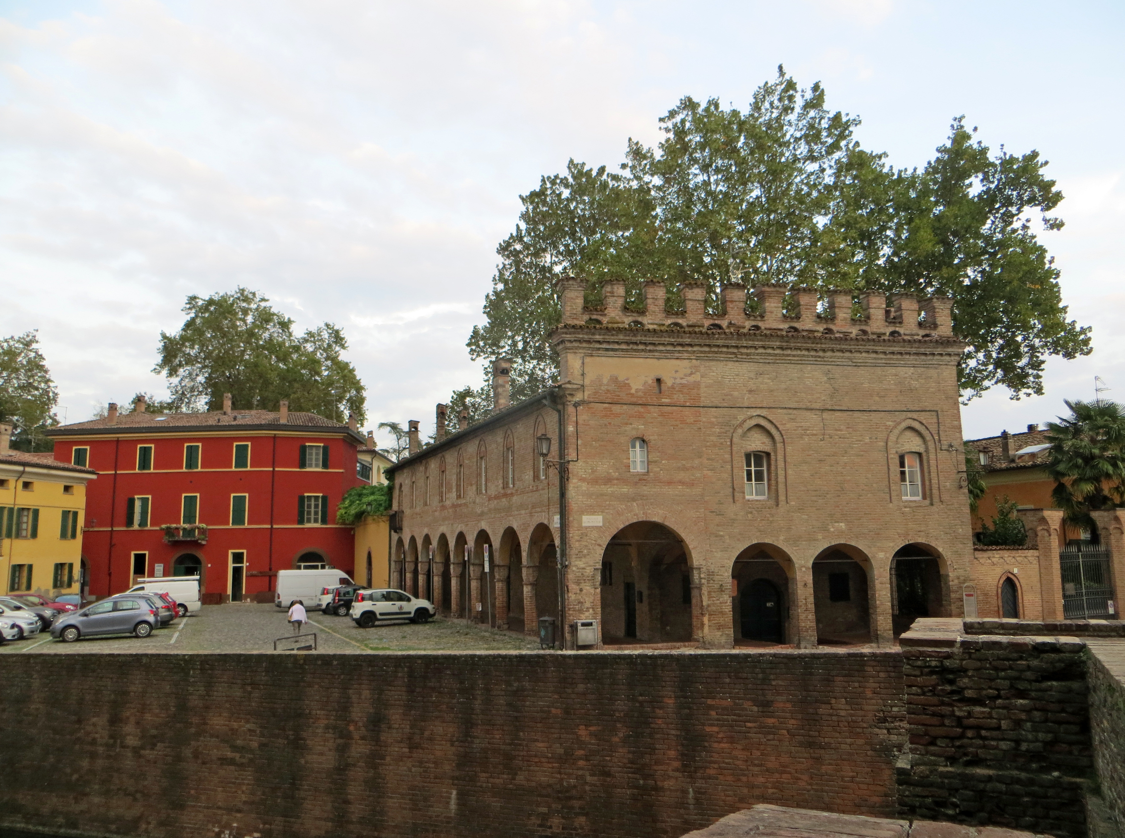 Piazza Giuseppe Garibaldi (Fontanellato) - Villa Gandini e Scuderie Sanvitale